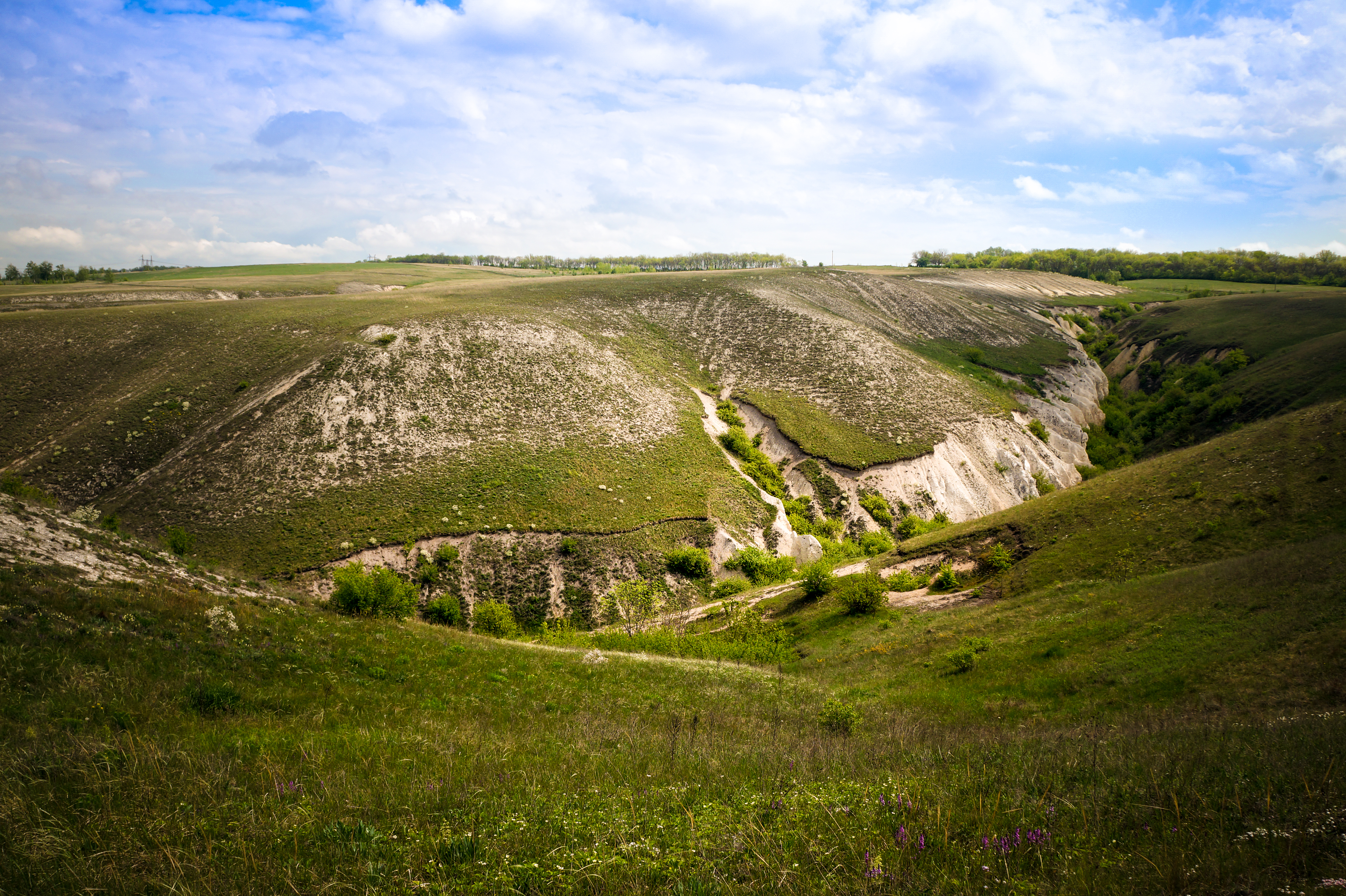 Природно-культурный комплекс «Дивногорье»: правый берег р. Тихая Сосна, при впадении неё в р. Дон, Дивногорье, Лискинский район, Воронежская область